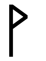 runic letter wunjo